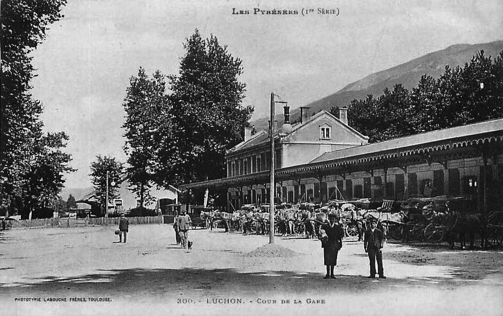 La cour extérieure de la gare de Luchon, avec les voitures et les omnibus pour les curistes de la station thermale de Bagnères-de-Luchon.